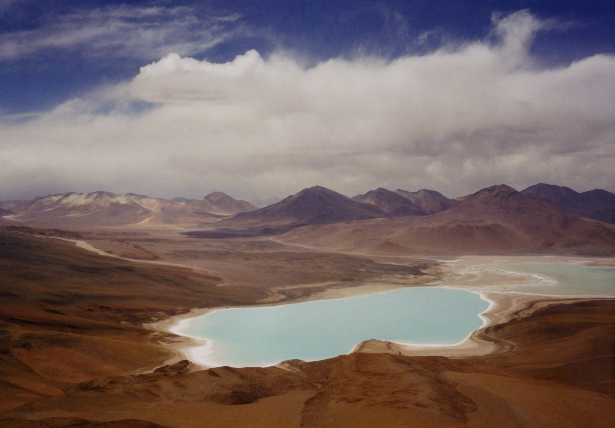 Laguna Verde, Bolivia